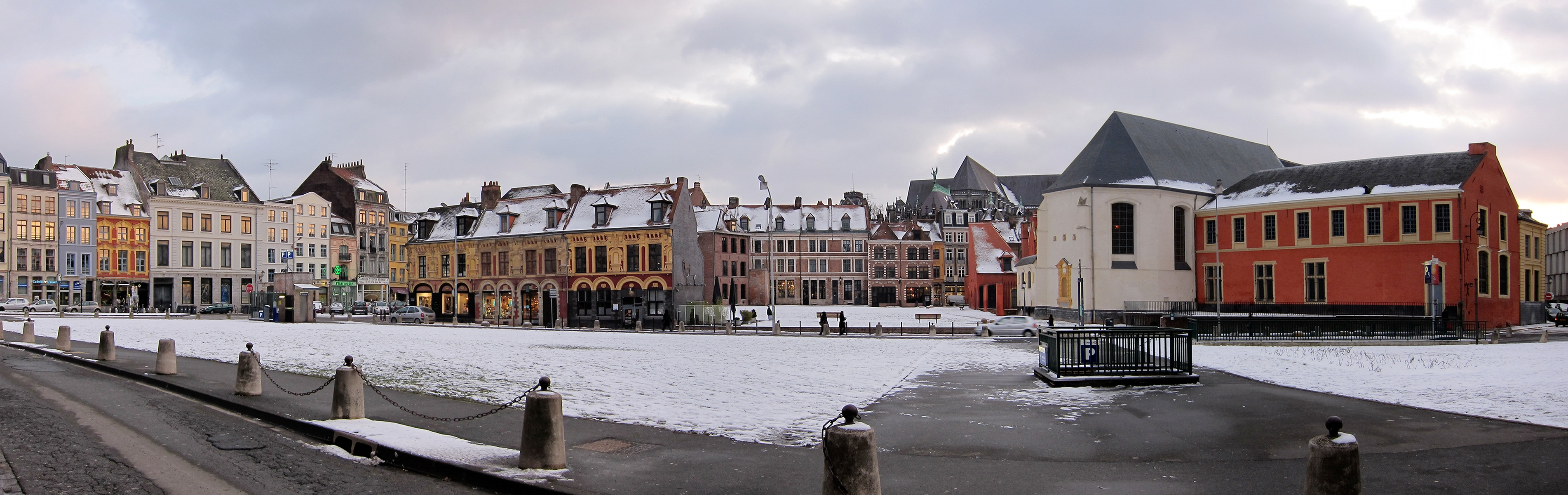 La place Louise de Bettignies à Lille (Nord).